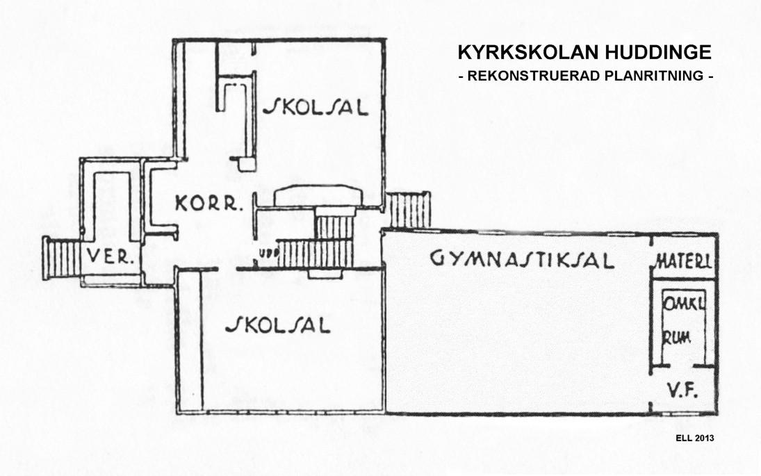 Huddinge kyrkskola, planritning (bottenvåning)